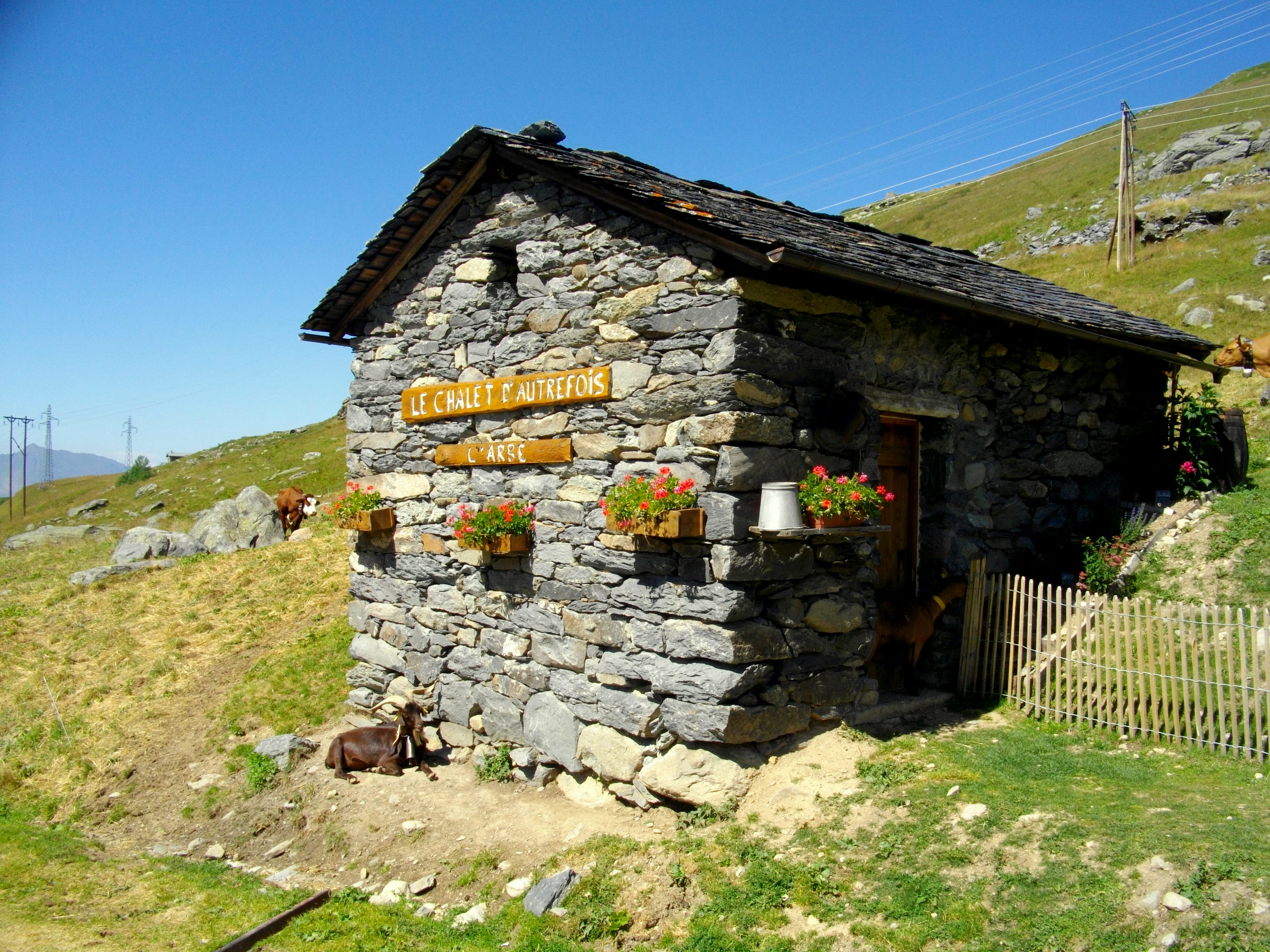 L'arbé : le chalet d'autrefois